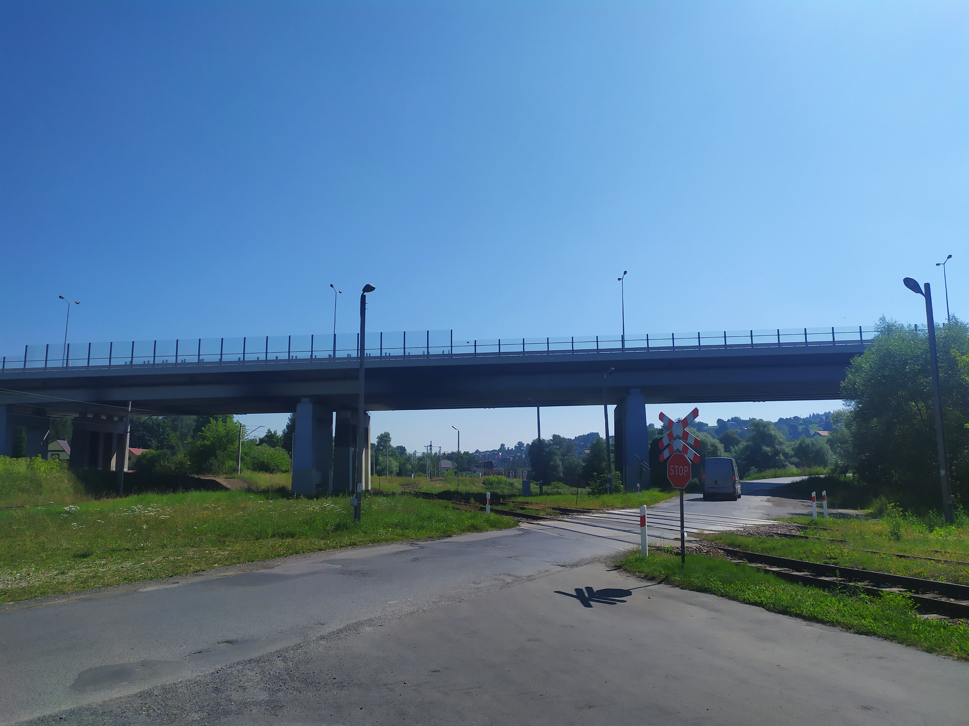 Wiadukt w ciągu DK47 na liniami kolejowymi 98 i 99 (Chabówka)